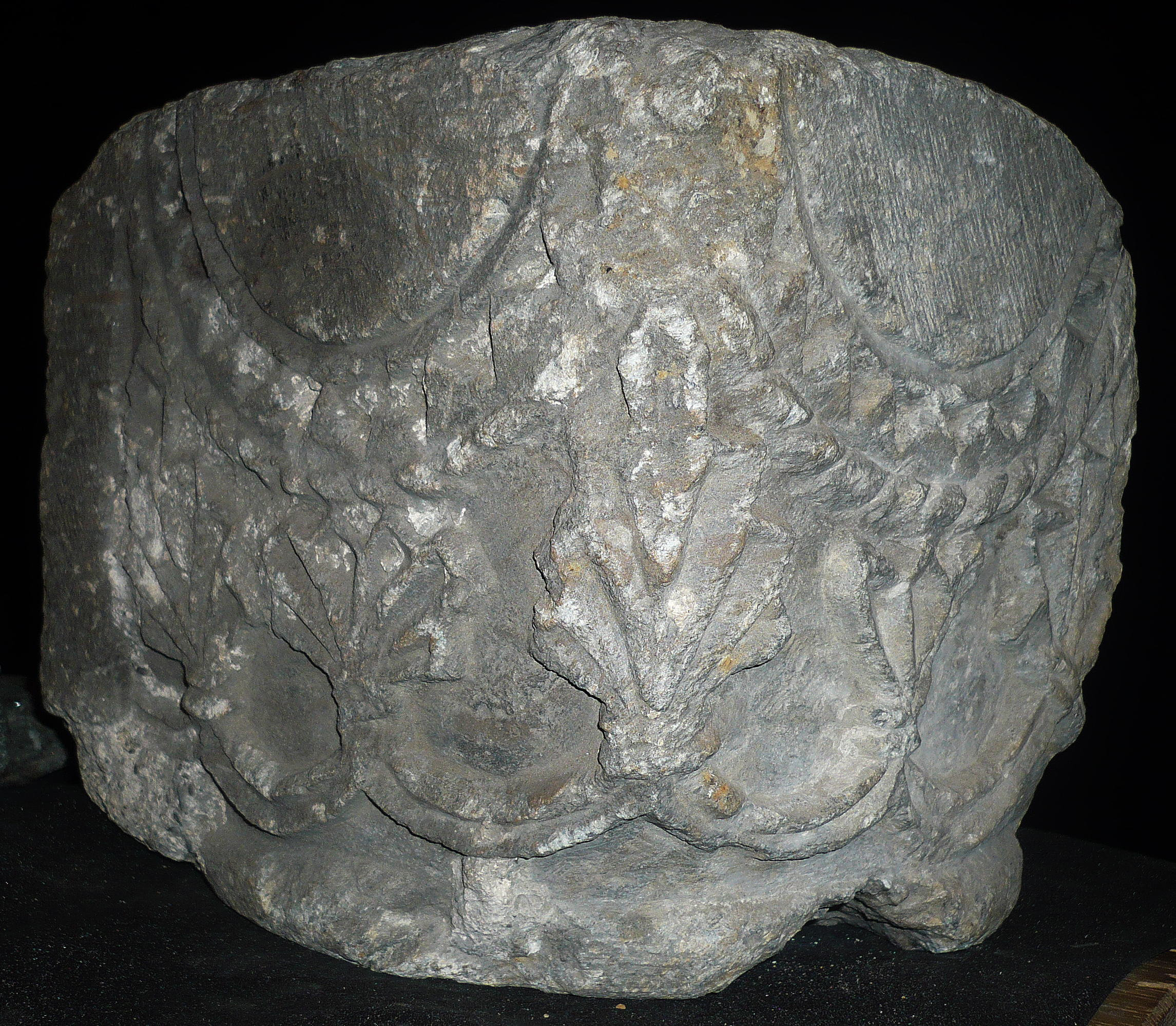 Kapitel fra Stavanger domkirke, som ble oppbevart under kirken.